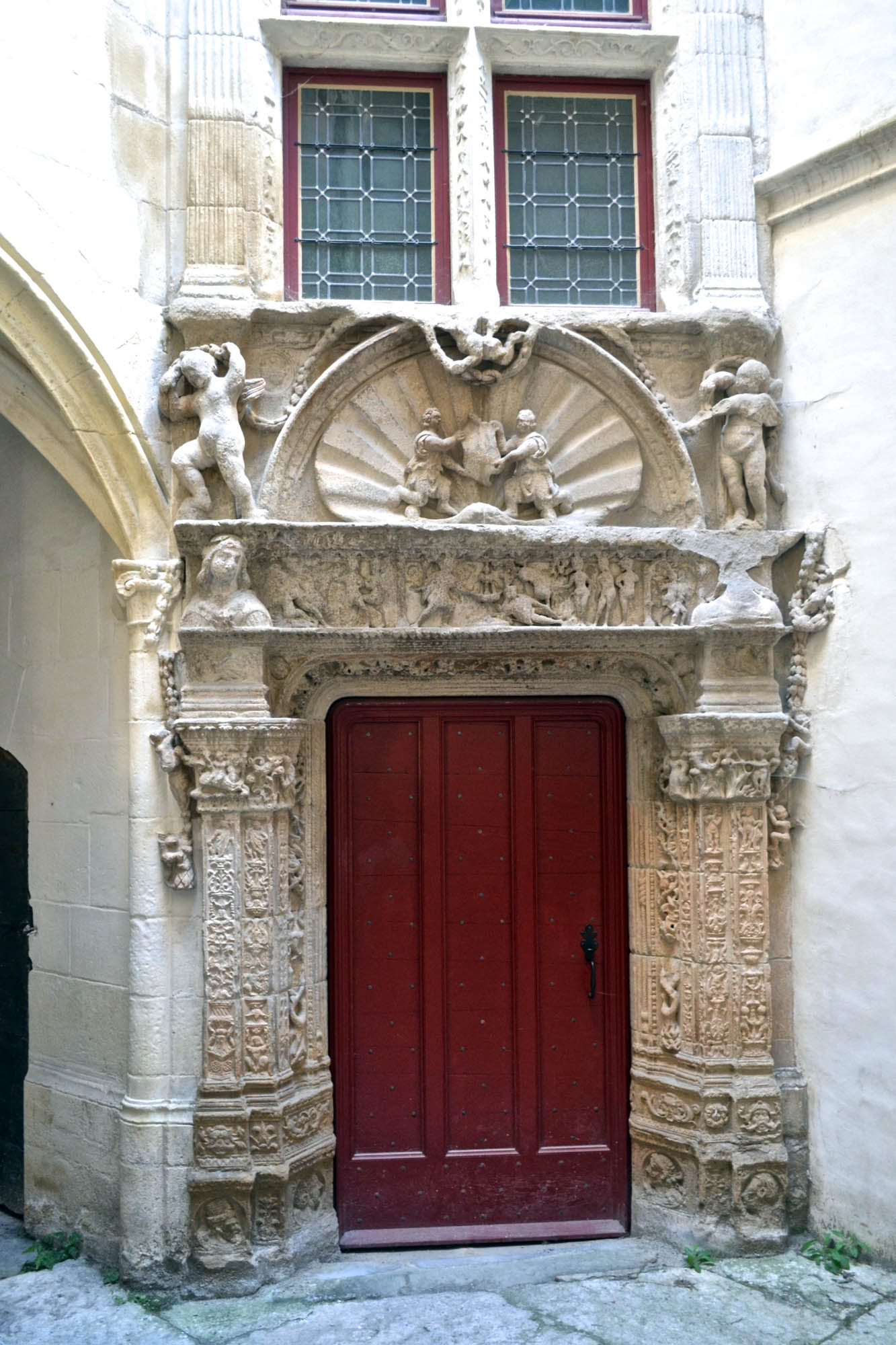 Maison Dupré-Latour à Valence (Drôme, France), XVIe s. Cour intérieure, porte de la tourelle d'escalier, décor Renaissance.